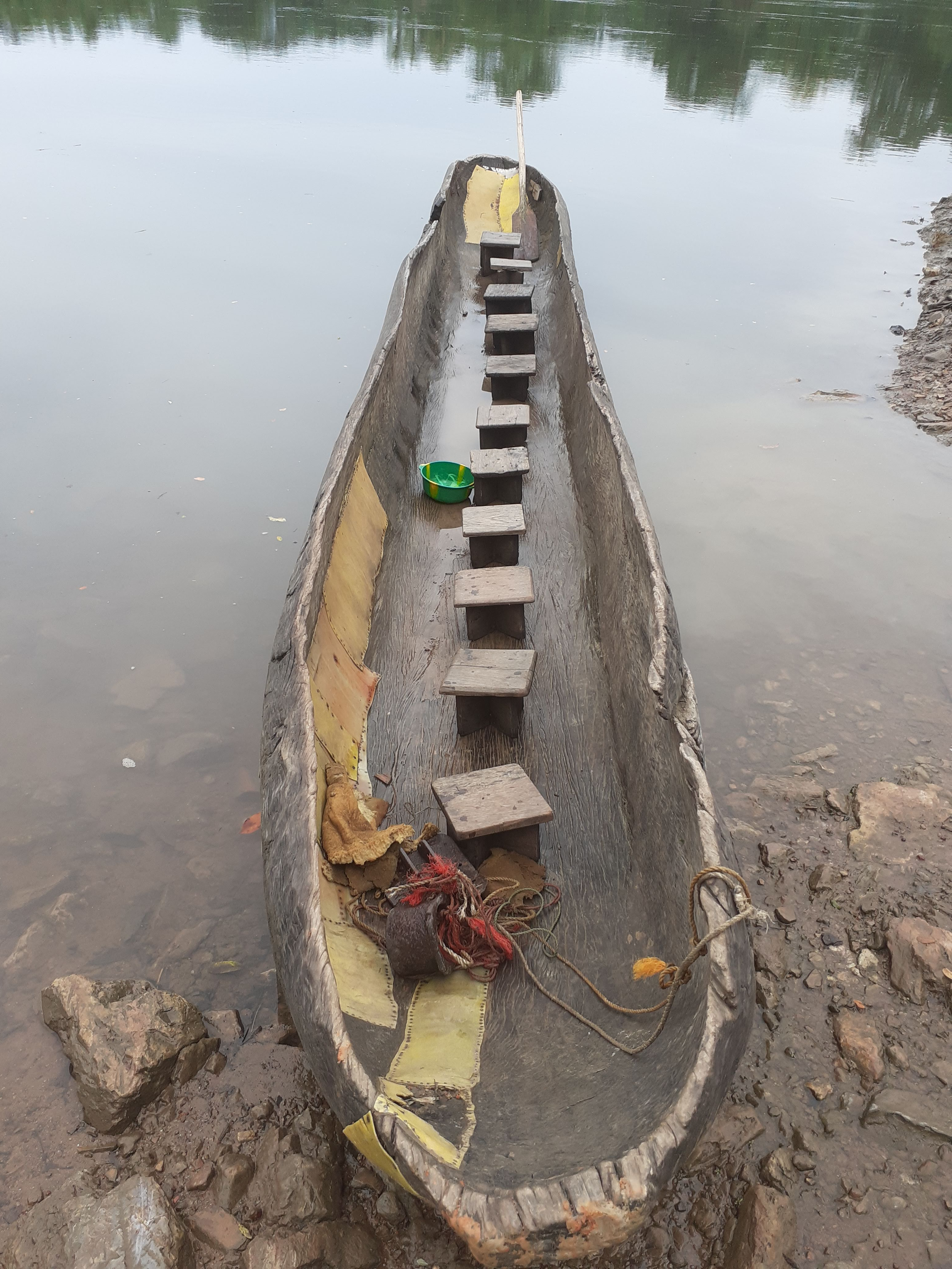 Pirogue sur le rio nunez This is an image with the theme "Africa on the Move or Transport" from: Guinea